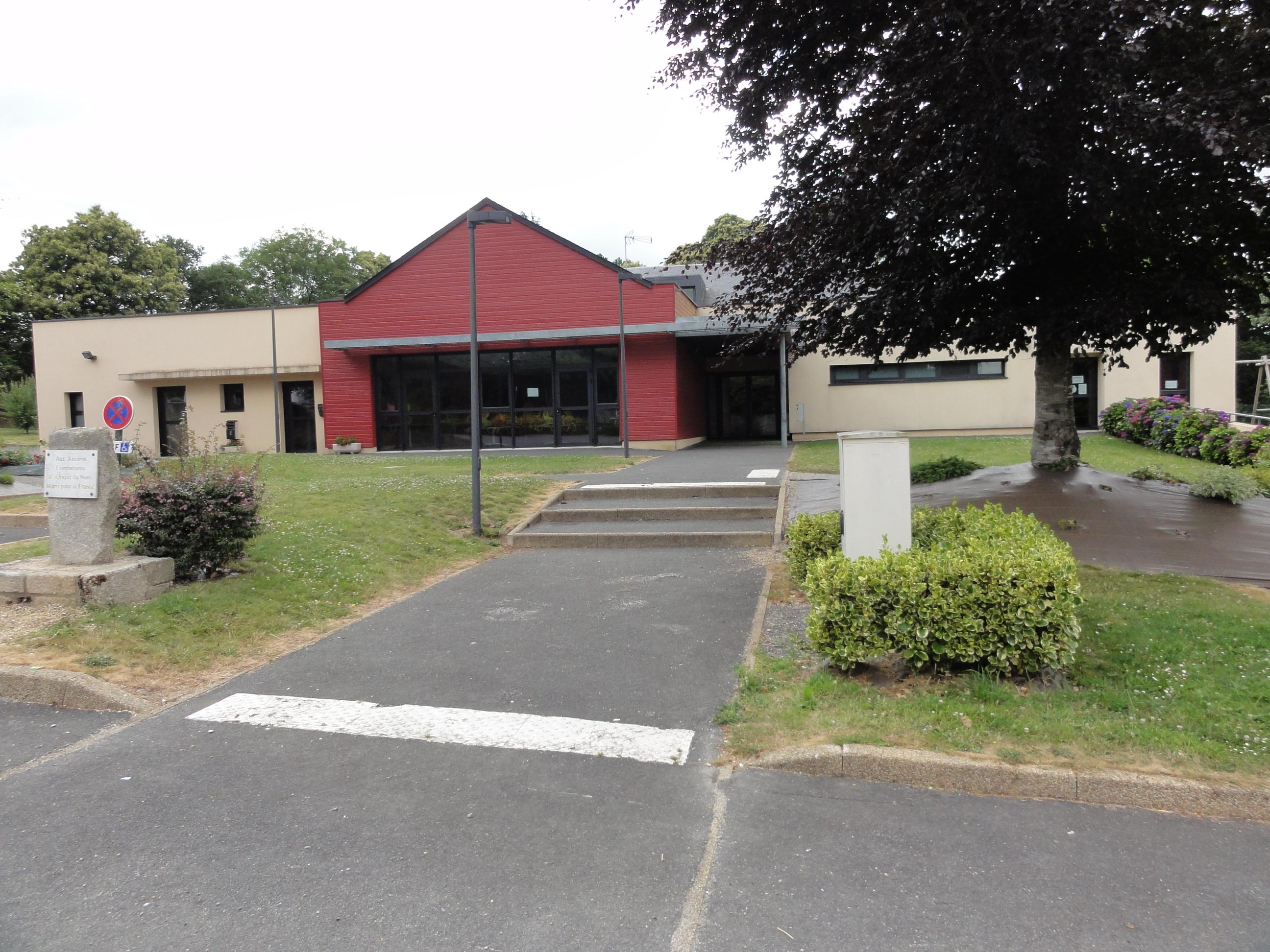 Batiment communal de la salle multifonctions et cantine scolaire et garderie de Priziac